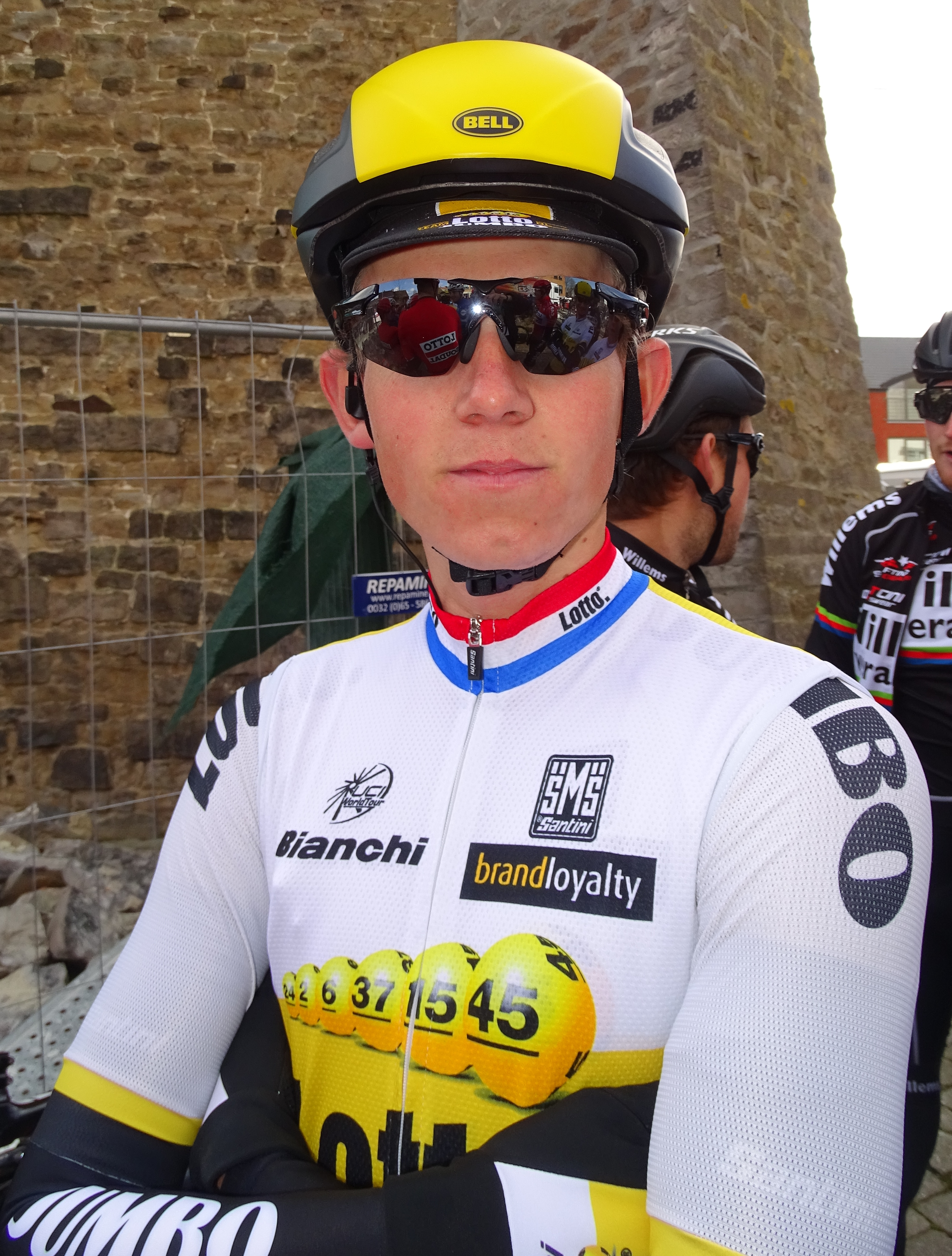 Reportage réalisé le mercredi 2 mars à l'occasion du départ du Samyn des Dames 2016 et du Samyn 2016 à Quaregnon, Belgique.